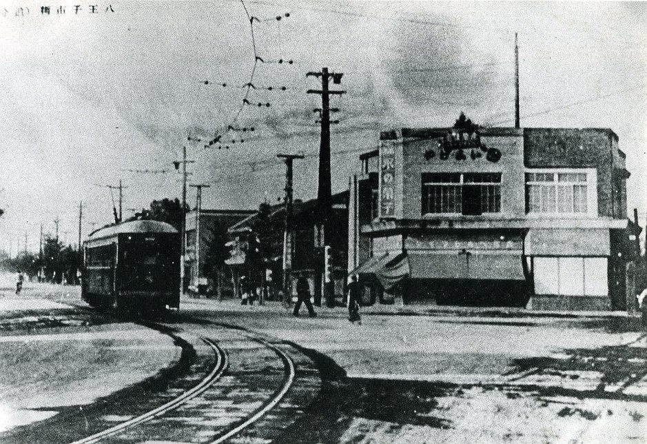 武蔵中央電気鉄道 横山付近